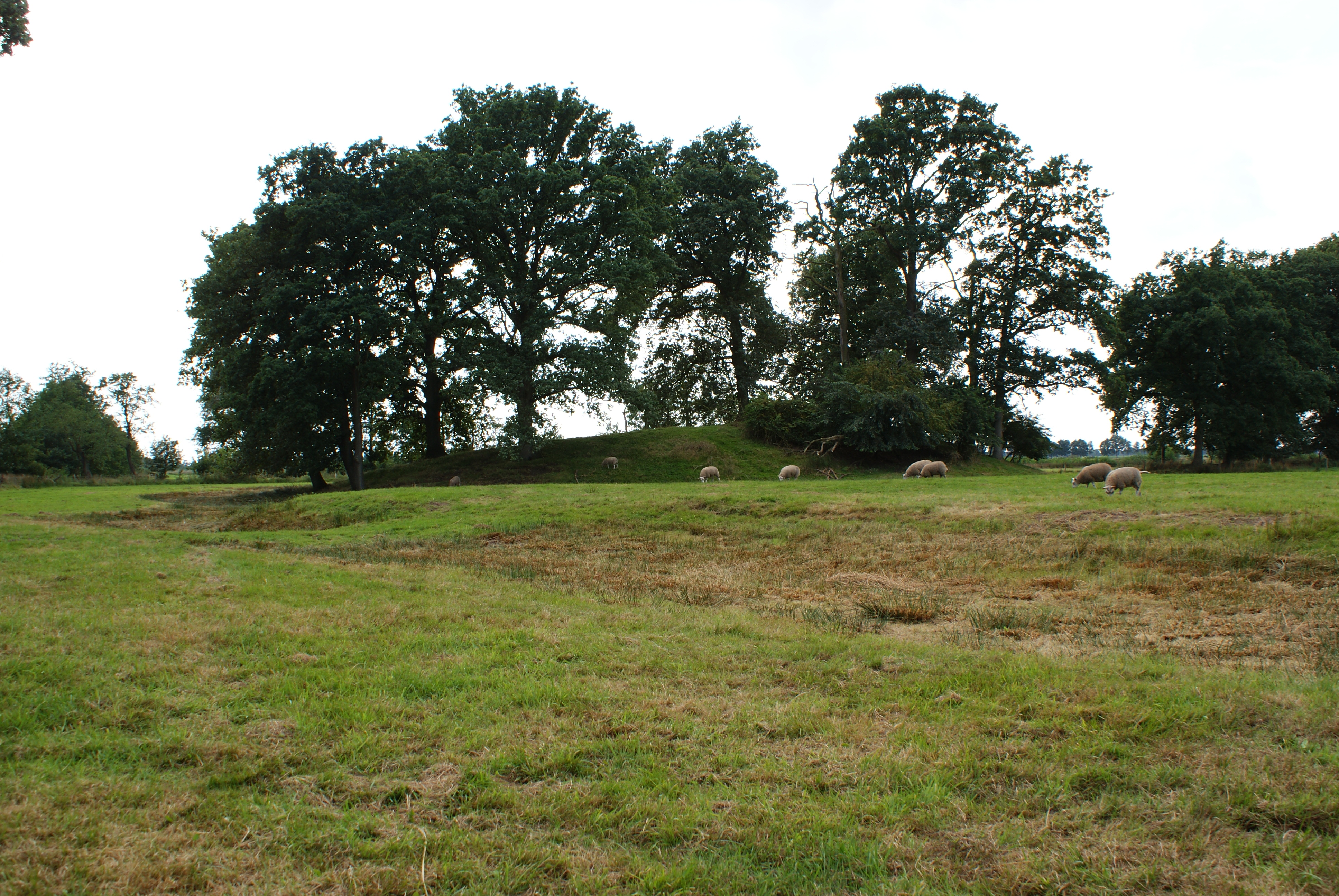 Motte-kasteel de Klinkenberg te Gees